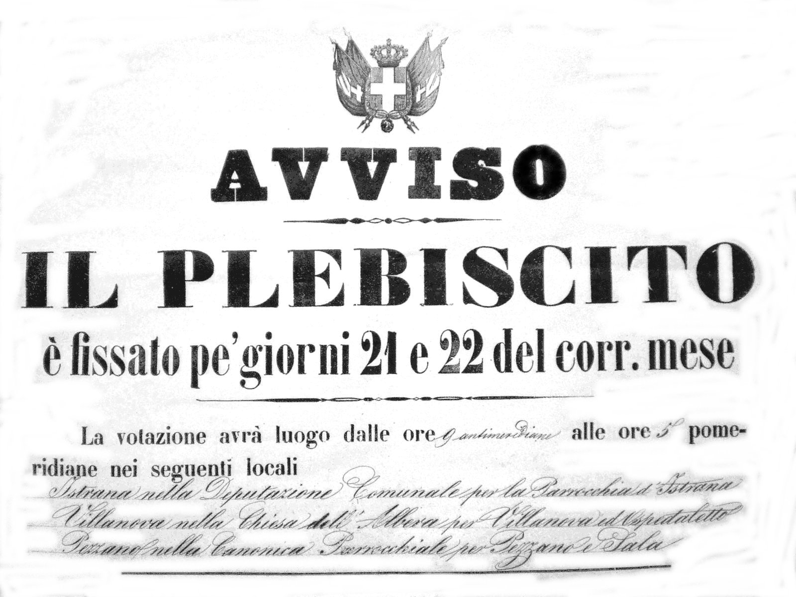 Avviso del Comune di Istrana (Treviso) per il plebiscito del 21-22 ottobre 1866 di annessione al Regno d'Italia